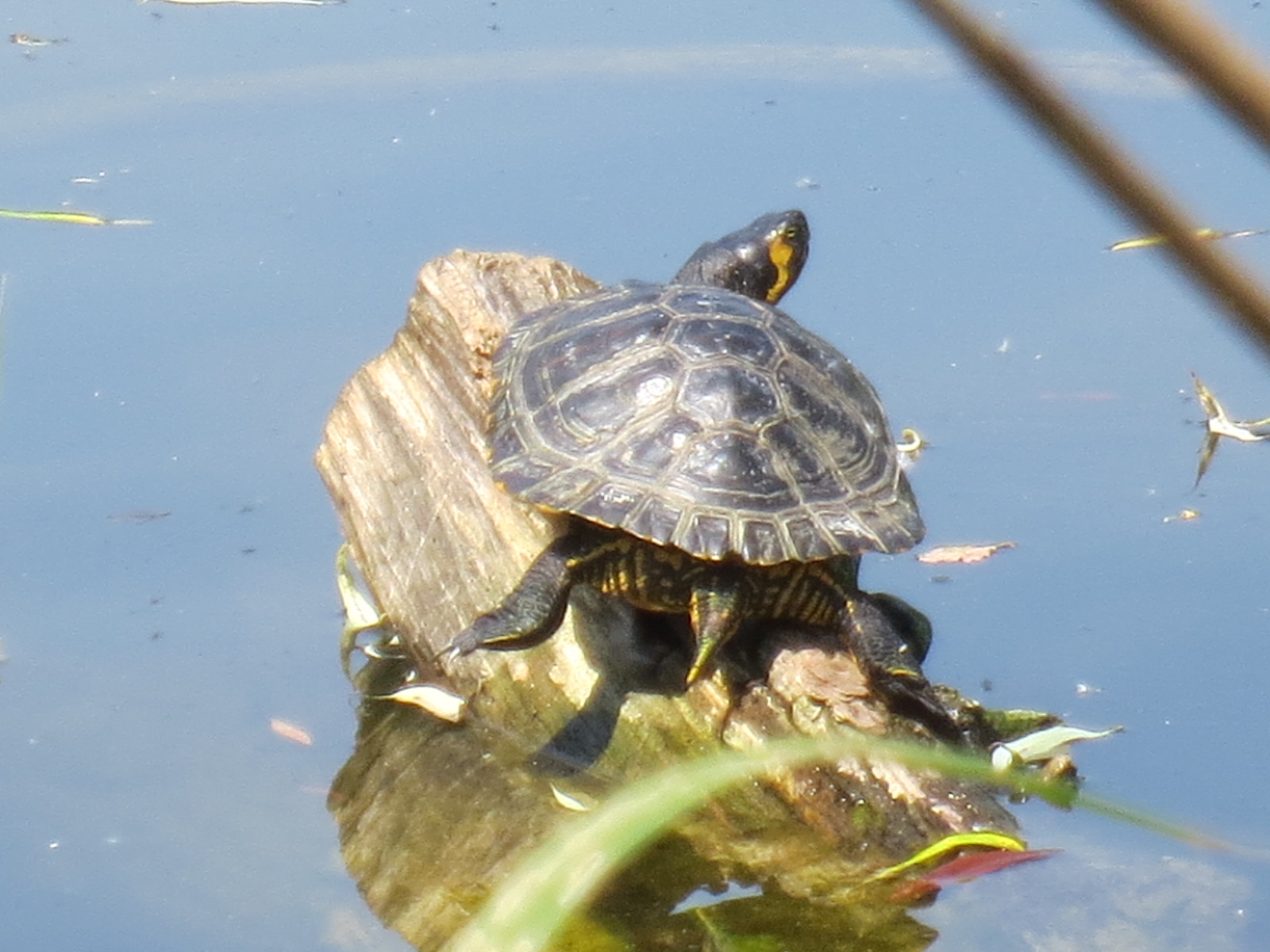 Aufgenommen 6. Juni ca. 13:00